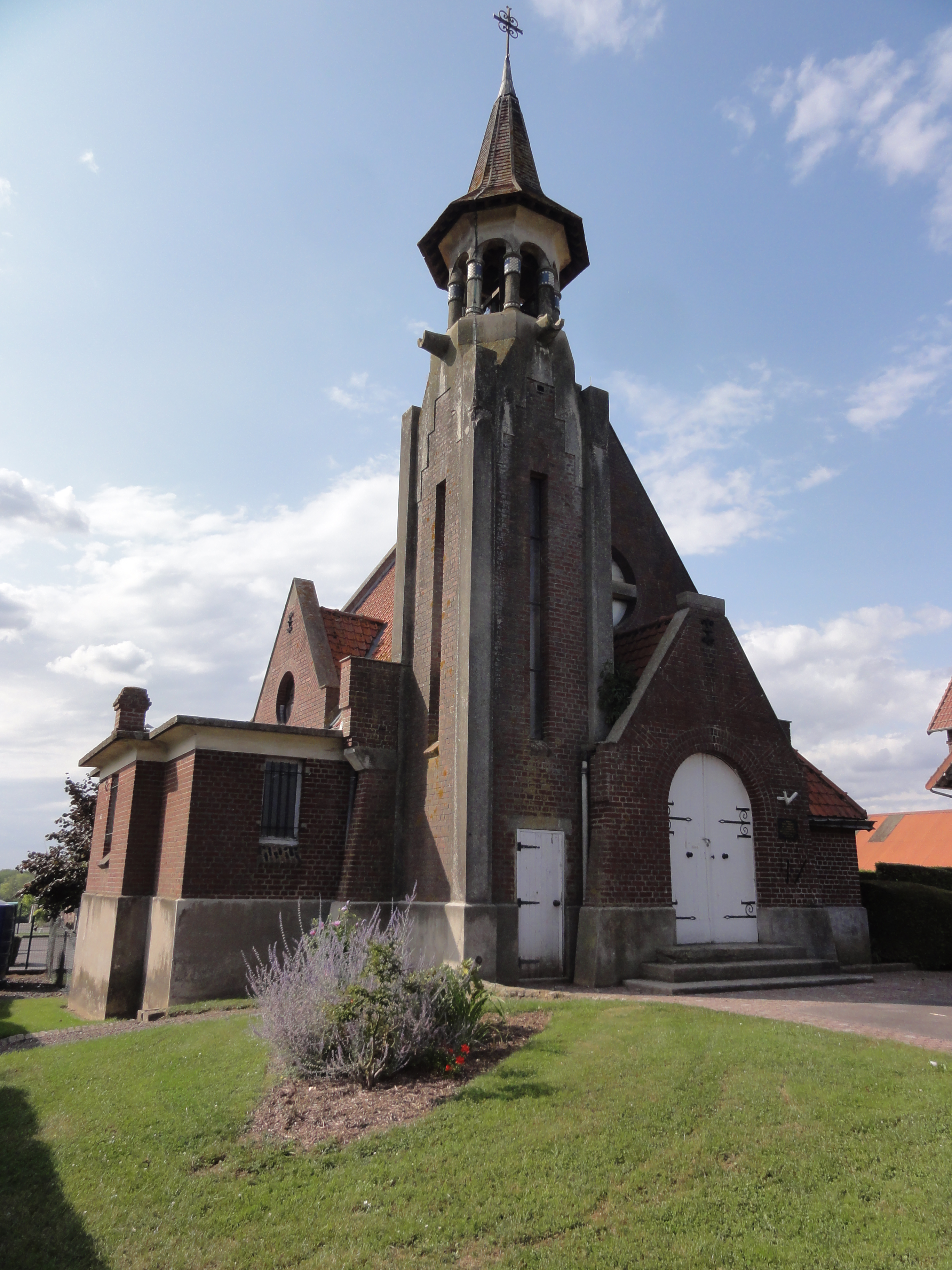 Contescourt (Aisne) église Saint-Amand